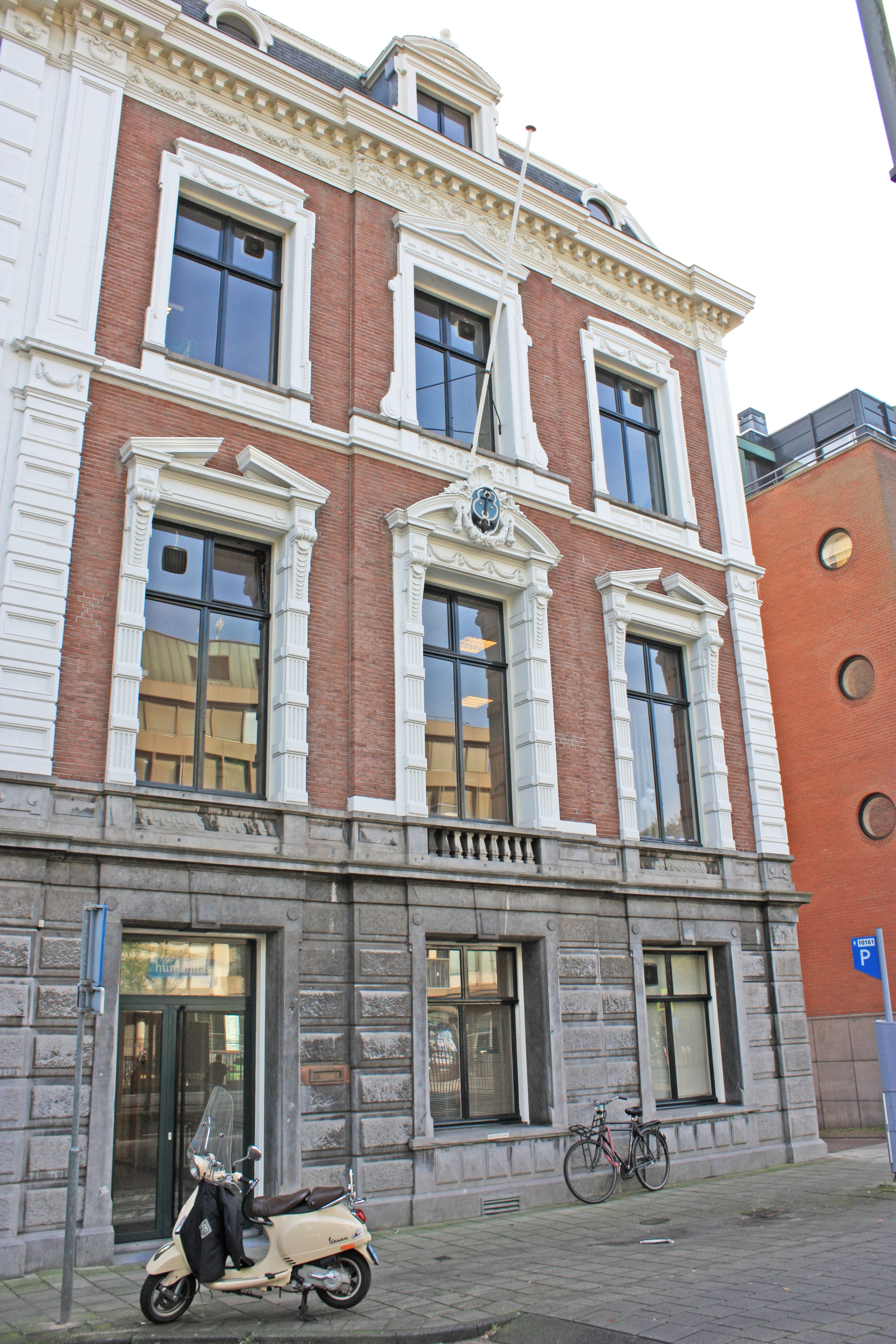 Landelijk Bureau van de Vereniging Humanitas in AmsterdamSarphatistraat 4, Amsterdam